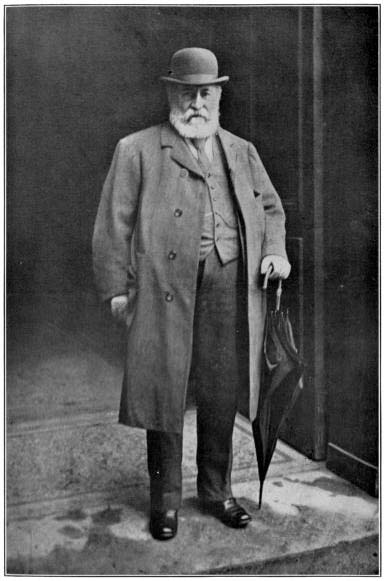 Ilustraciones libro de Memorias Saint-Saëns, 1919